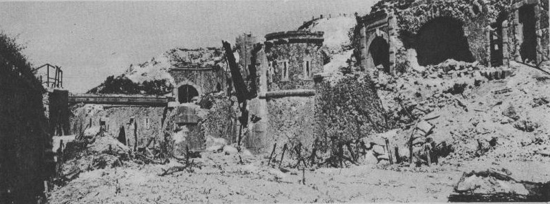 Fort de la Pompelle, l'état de la douve de se fort, clef de résistance de la ville de Reims.